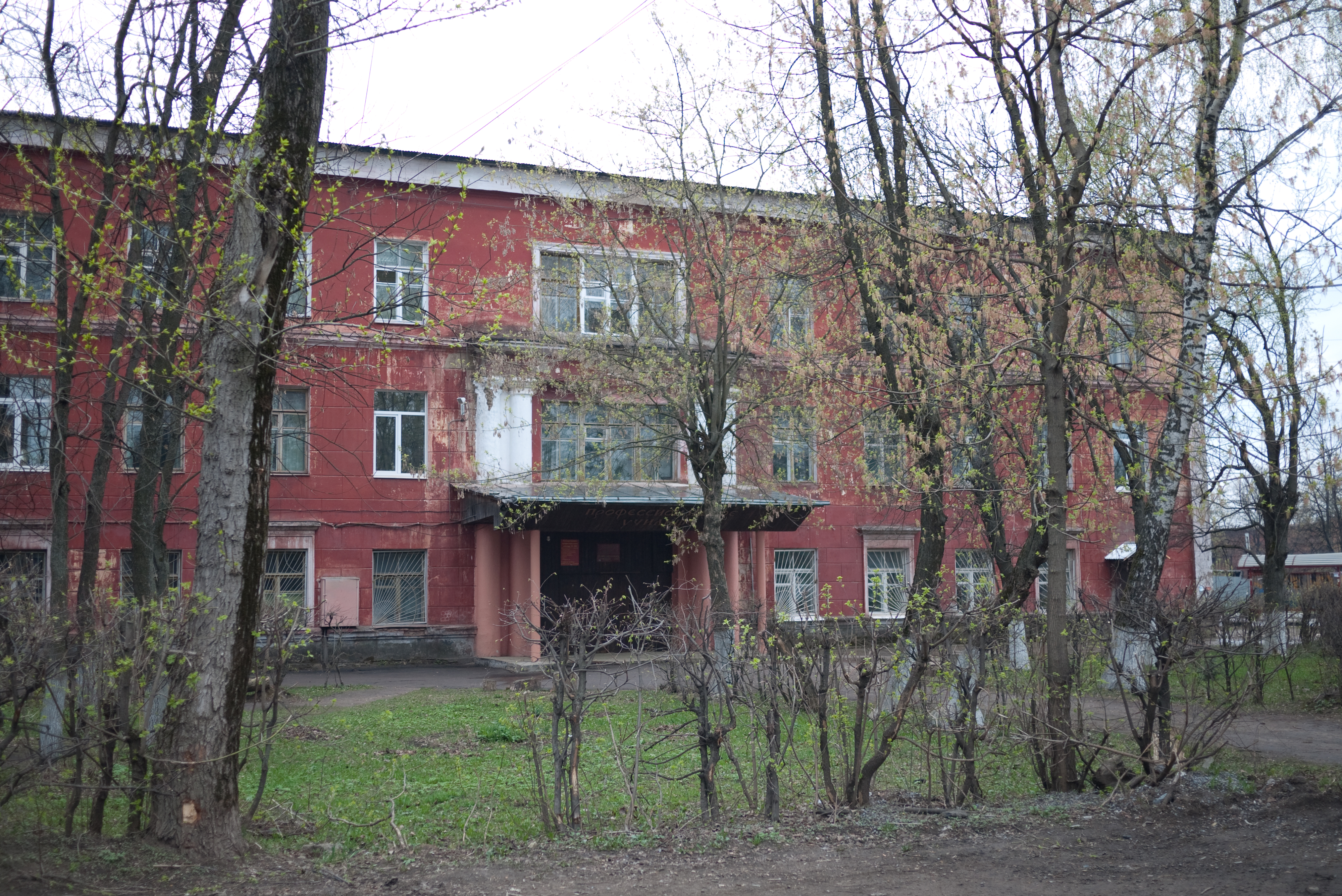 Профессиональное училище № 130. Город Ивантеевка Московской области.